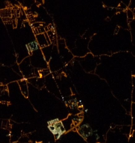 Detalhe da imagem original, centrada na freguesia de Fajozes